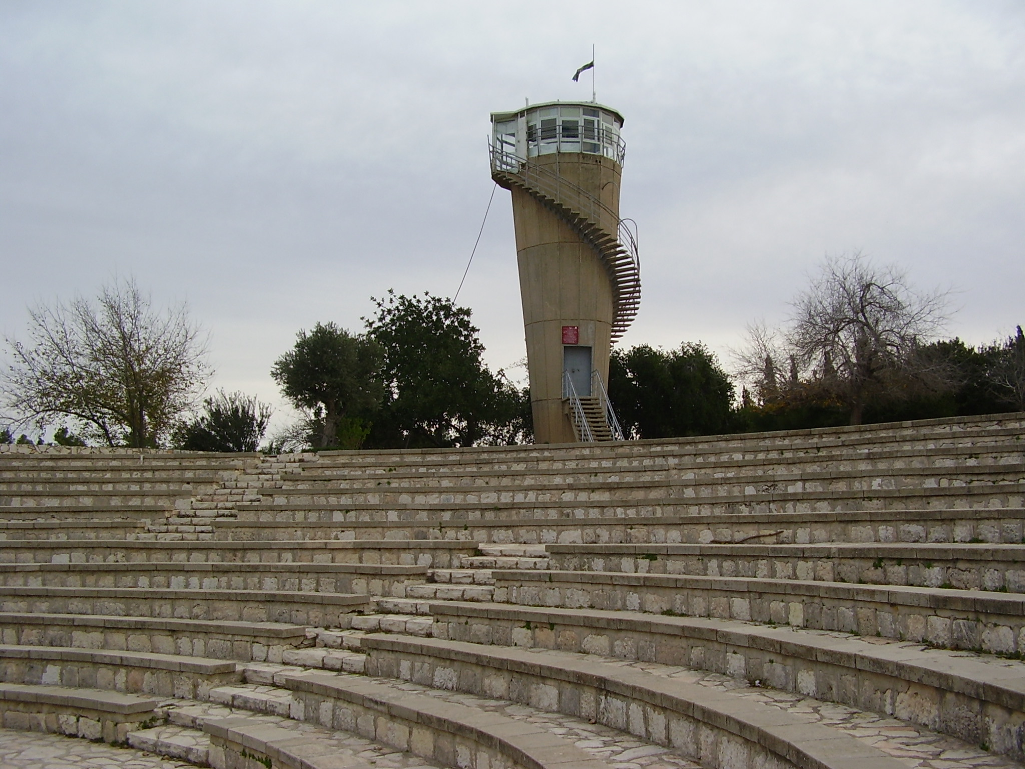 "מצפה מודיעין" ביער בן שמן